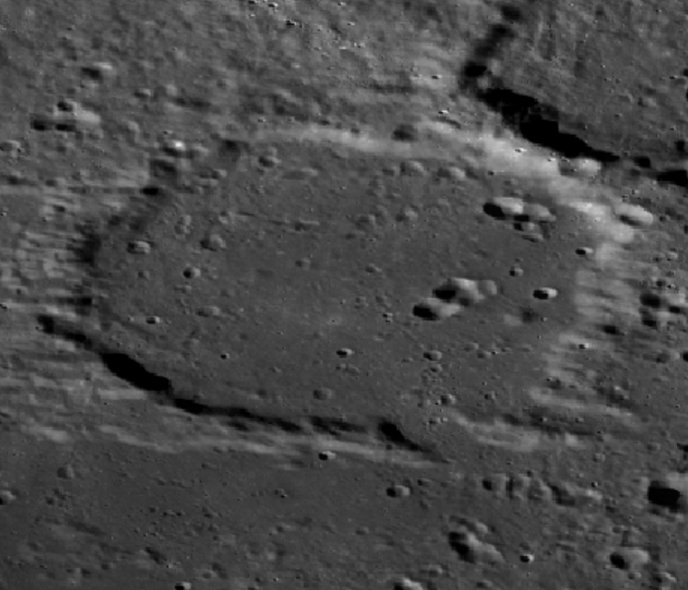 Cráter lunar Oenopides. (Imagen LRO)